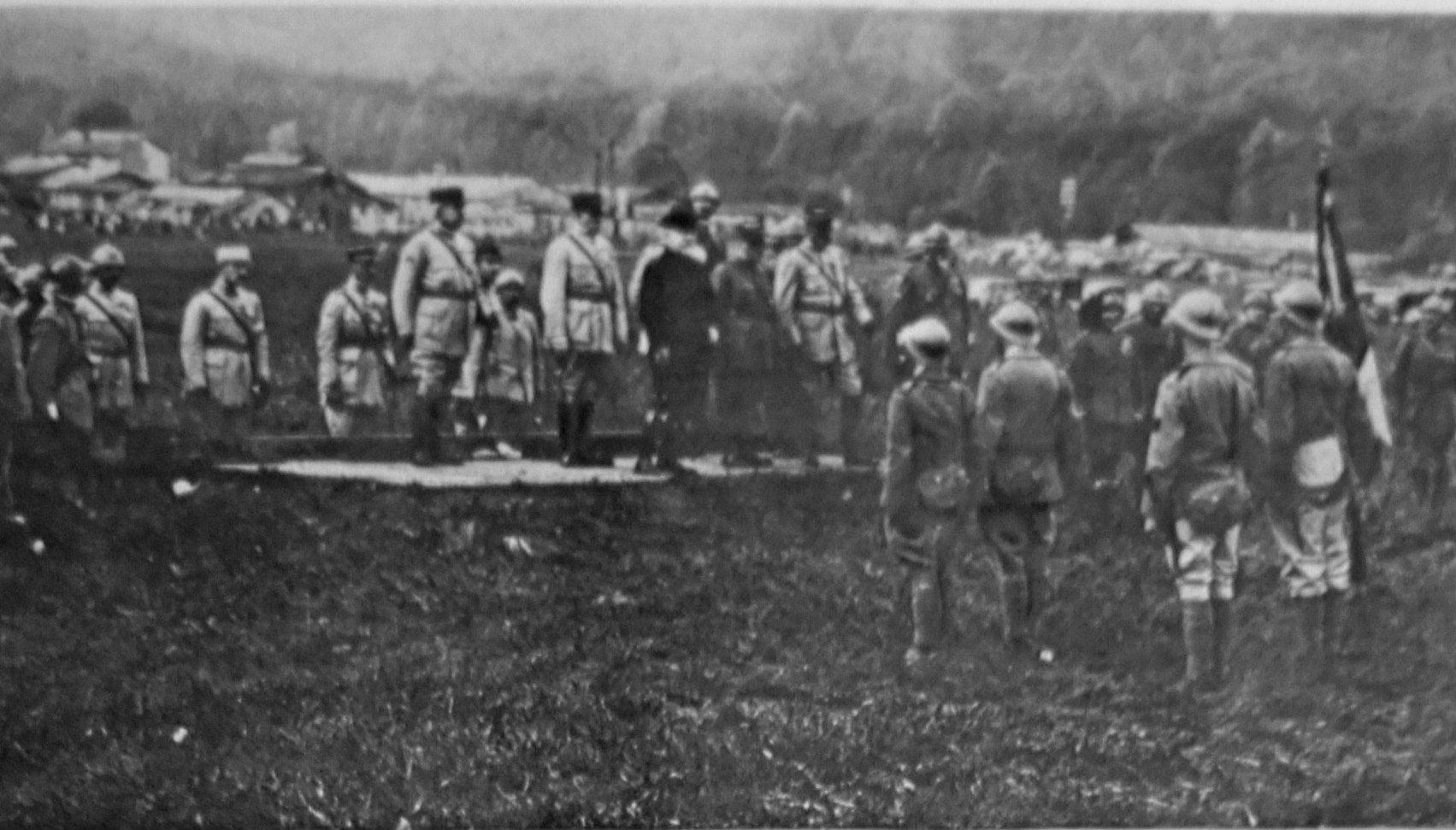 Le président Poincaré .